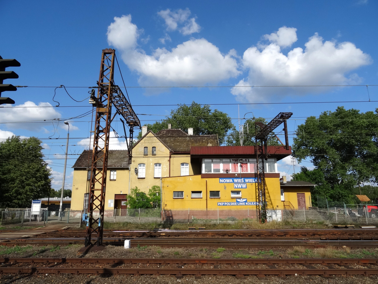 Stacja kolejowa Nowa Wieś Wielka, powiat bydgoski - na linii kolejowej nr 131 i nr 201